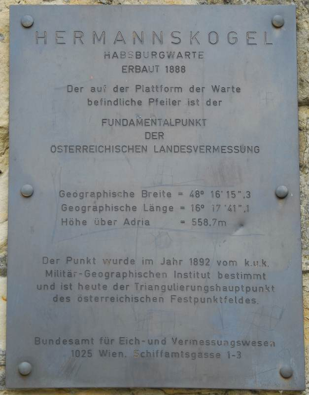 Hinweistafel an der Habsburgwarte: Erbaut 1888. Trägt seit 1892 einen Vermessungspunkt auf der Plattform, heute der Fundamentalpunkt der österreichischen Landesvermessung.